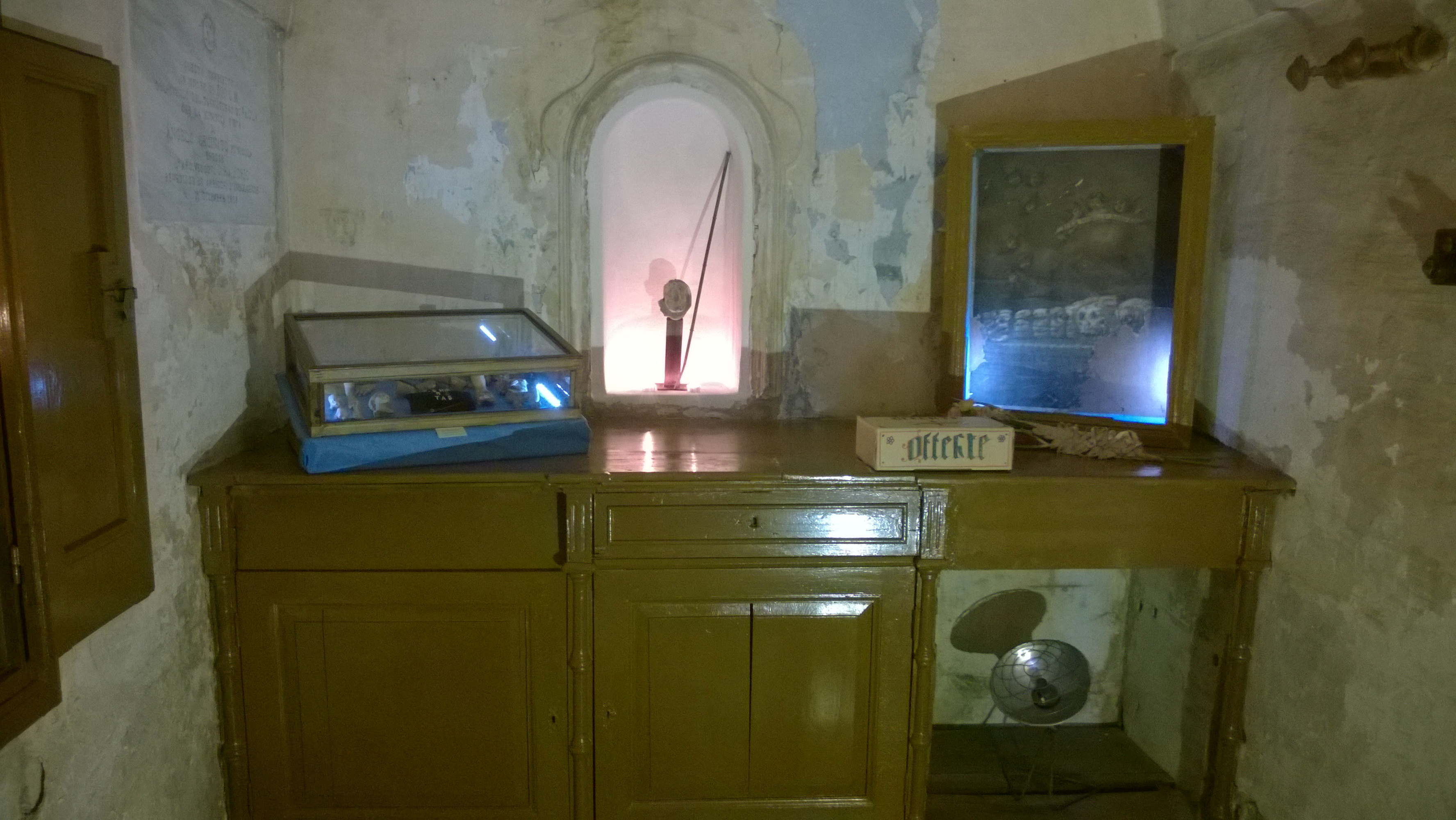 Sacrestia Cappella Rurale